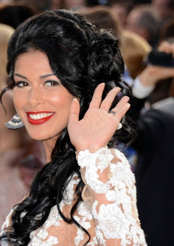 Ayem Nour au festival de Cannes